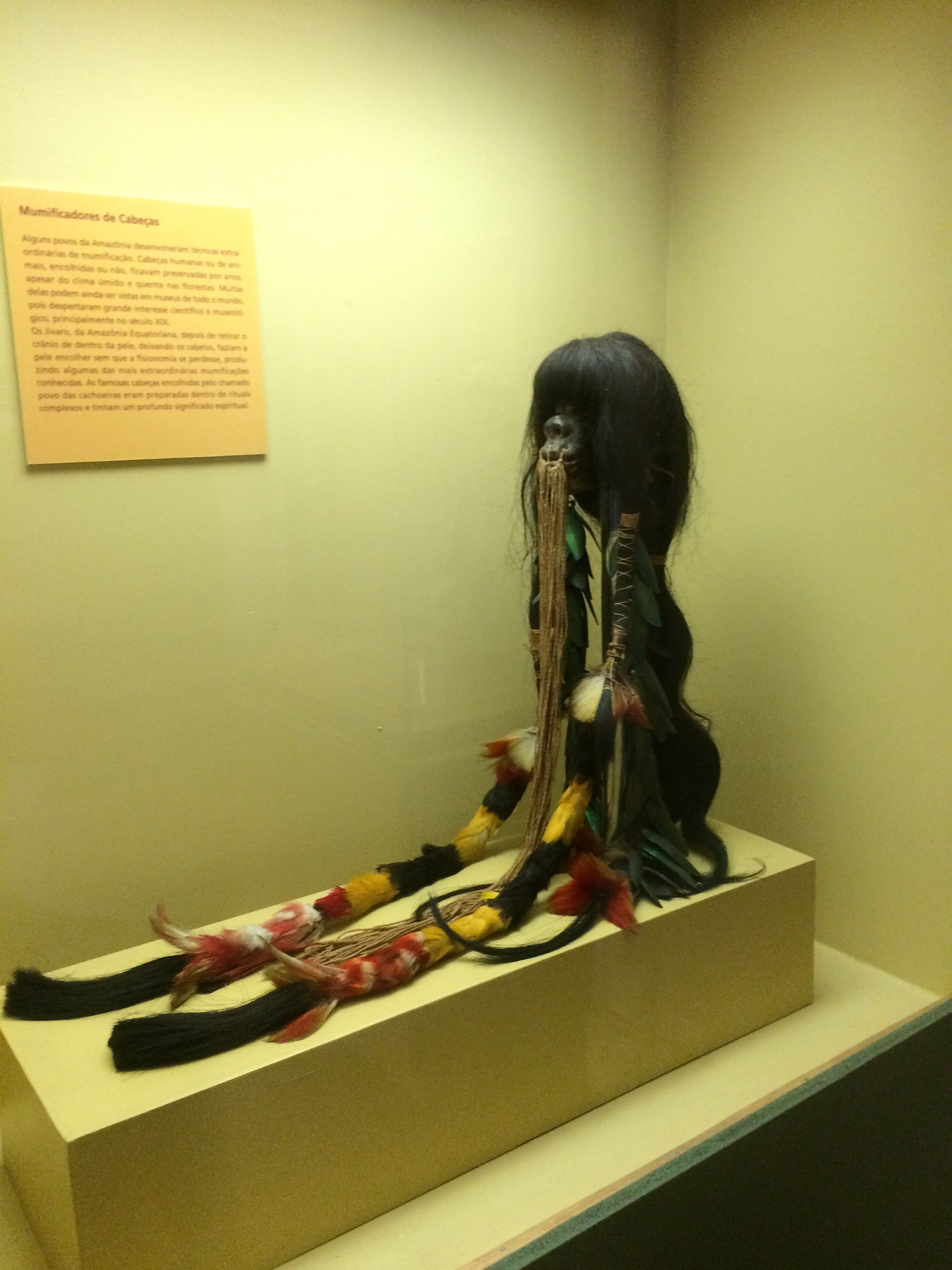 Acervo do Museu Nacional